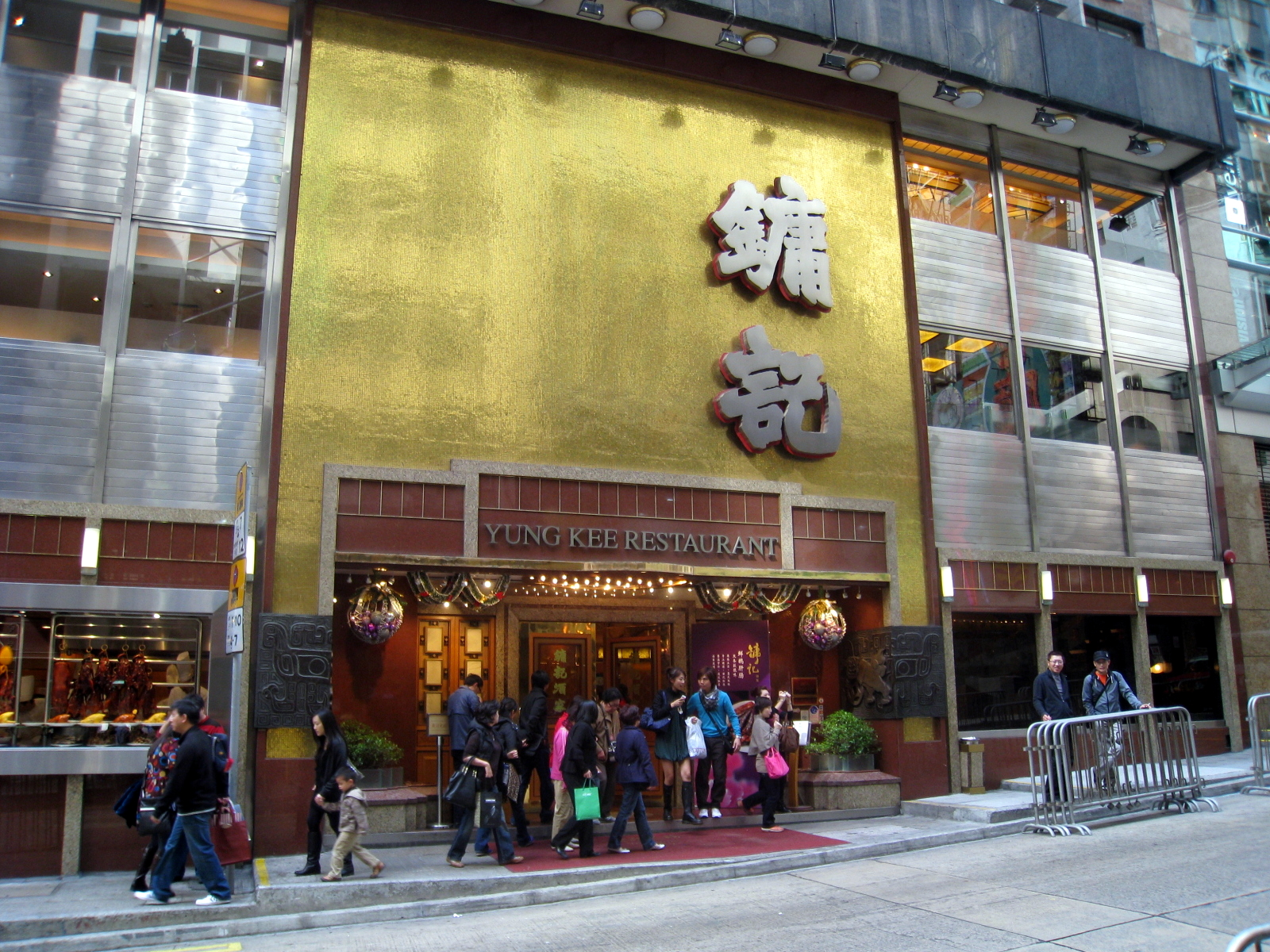 Yung Kee Restaurant 鏞記酒家